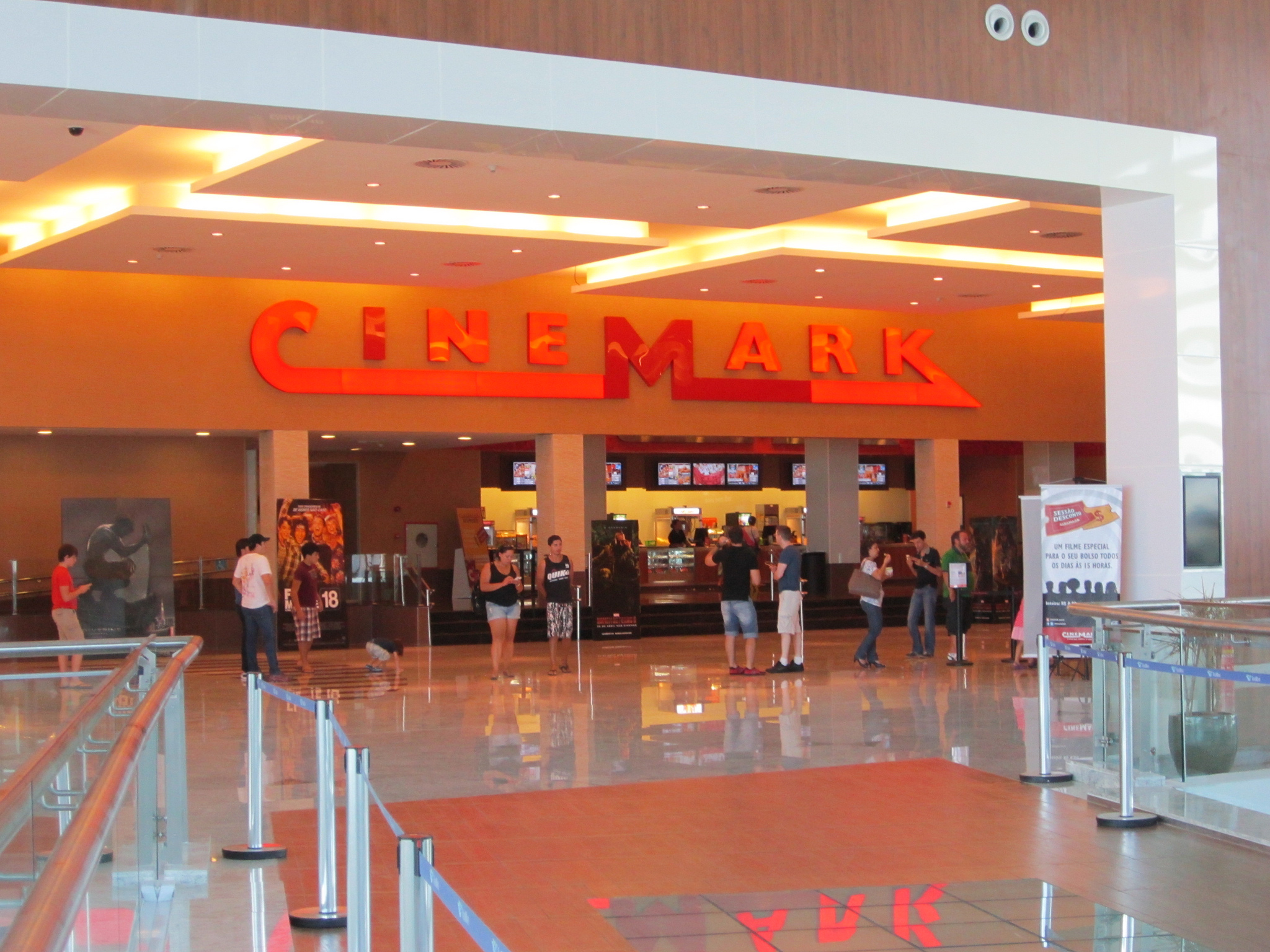 Cinemark no RioMar Shopping - Recife, Pernambuco, Brasil